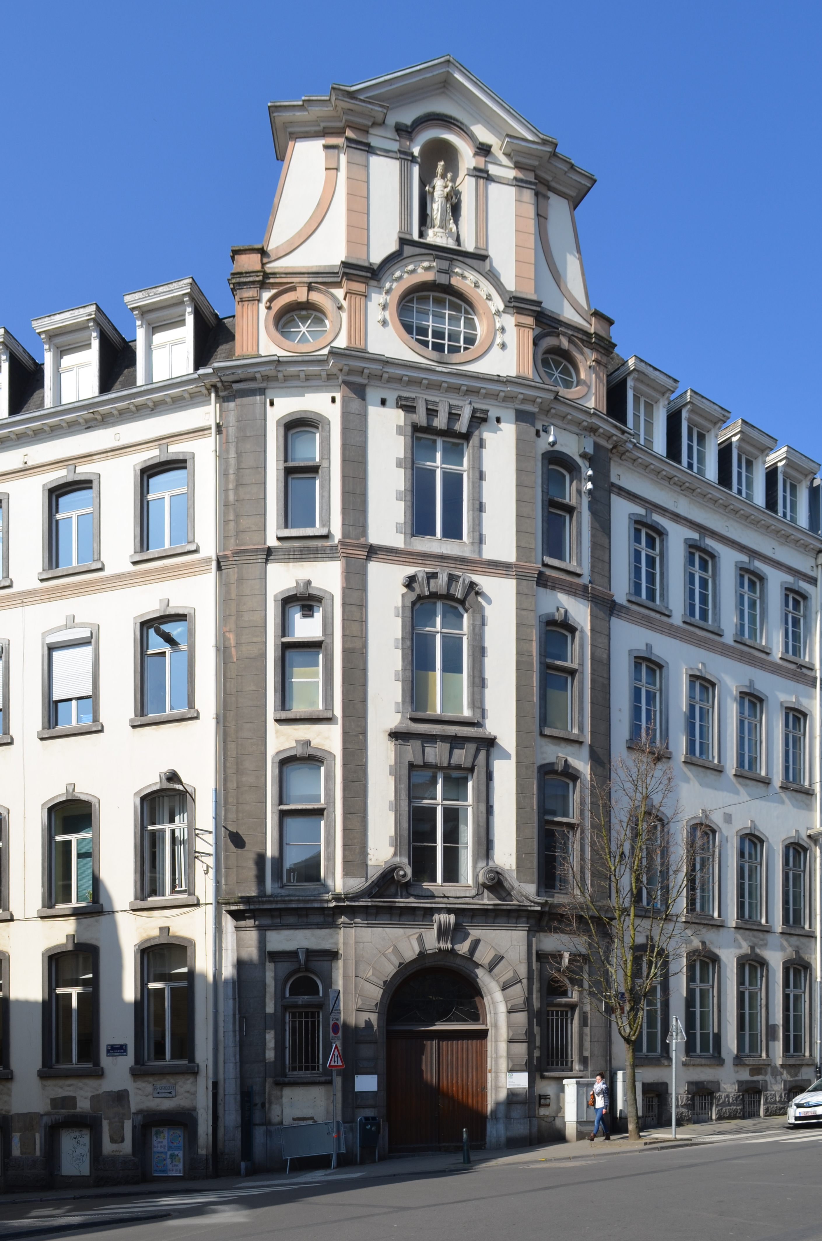 Université de Namur - ancienne entrée principale à la rue de Bruxelles.